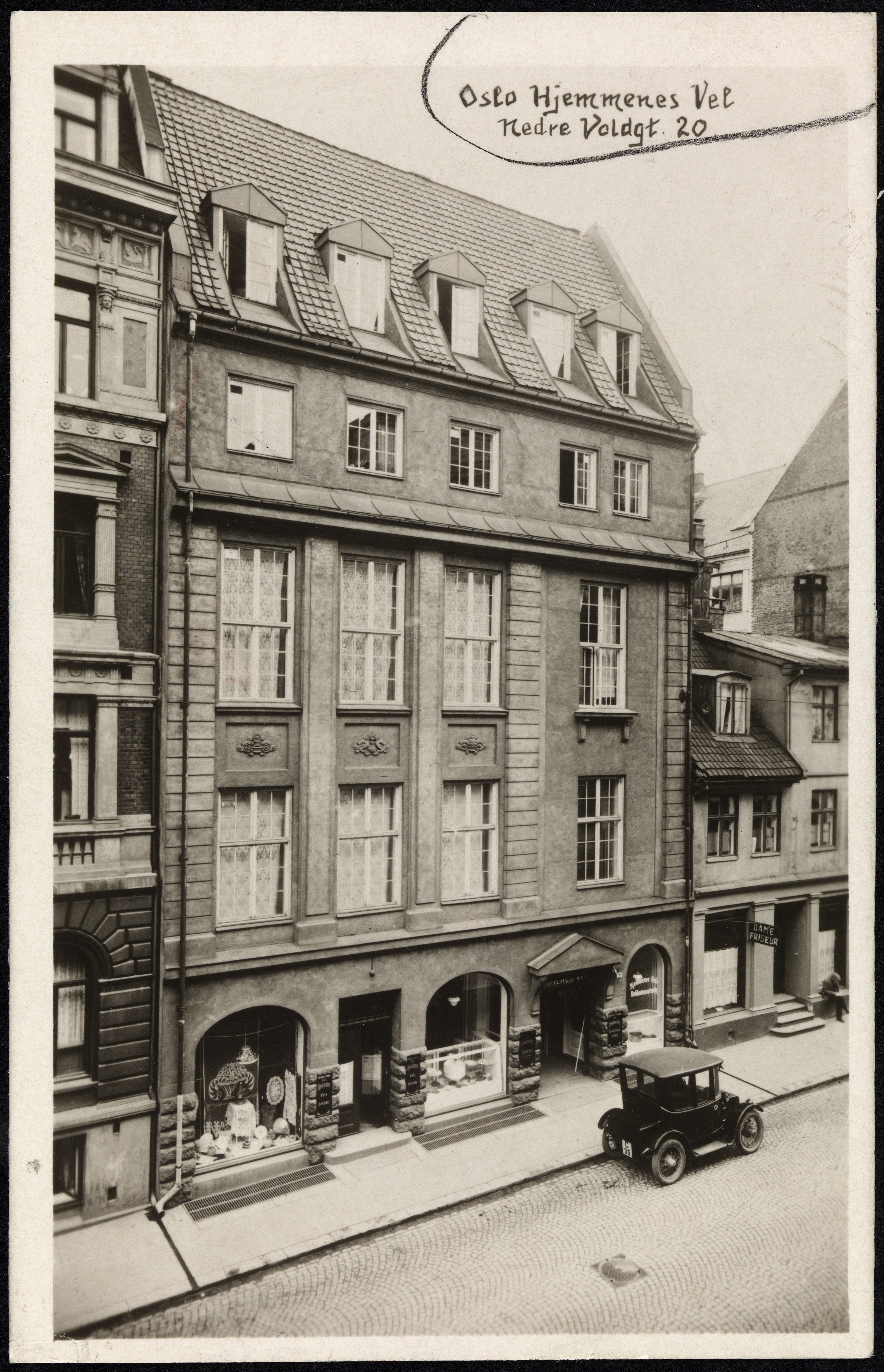 Beskrivelse / Description: Oslo Hjemmenes Vel, stiftet 1898 av Dorothea Christensen, var Europas eldste husmorforening til den ble avviklet i slutten av 1970-årene. Dato / Date: ukjent / unknown Sted / Place: Norge, Oslo, Kvadraturen, Nedre Vollgate 20 Fotograf / Photographer: ukjent / unknown Utgiver / Publisher: ukjent / unknown Digital kopi av original / Digital copy of original: sv/hv postkort, sølvgelatin Eier / Owner Institution: Nasjonalbiblioteket / National Library of Norway Lenke / Link: Bildesignatur / Image Number: bldsa_PK01091